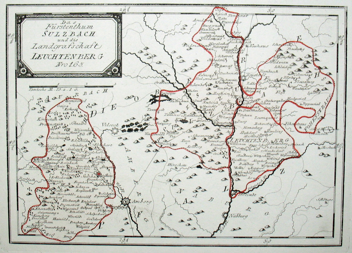 Das Fürstenthum Sulzbach und die Landgrafschaft Leuchtenberg. Nro. 165. Kolorierter Kupferstich